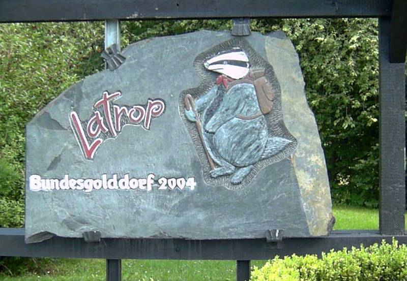 Latrop (Schmallenberg) Hinweistafel, Germany.